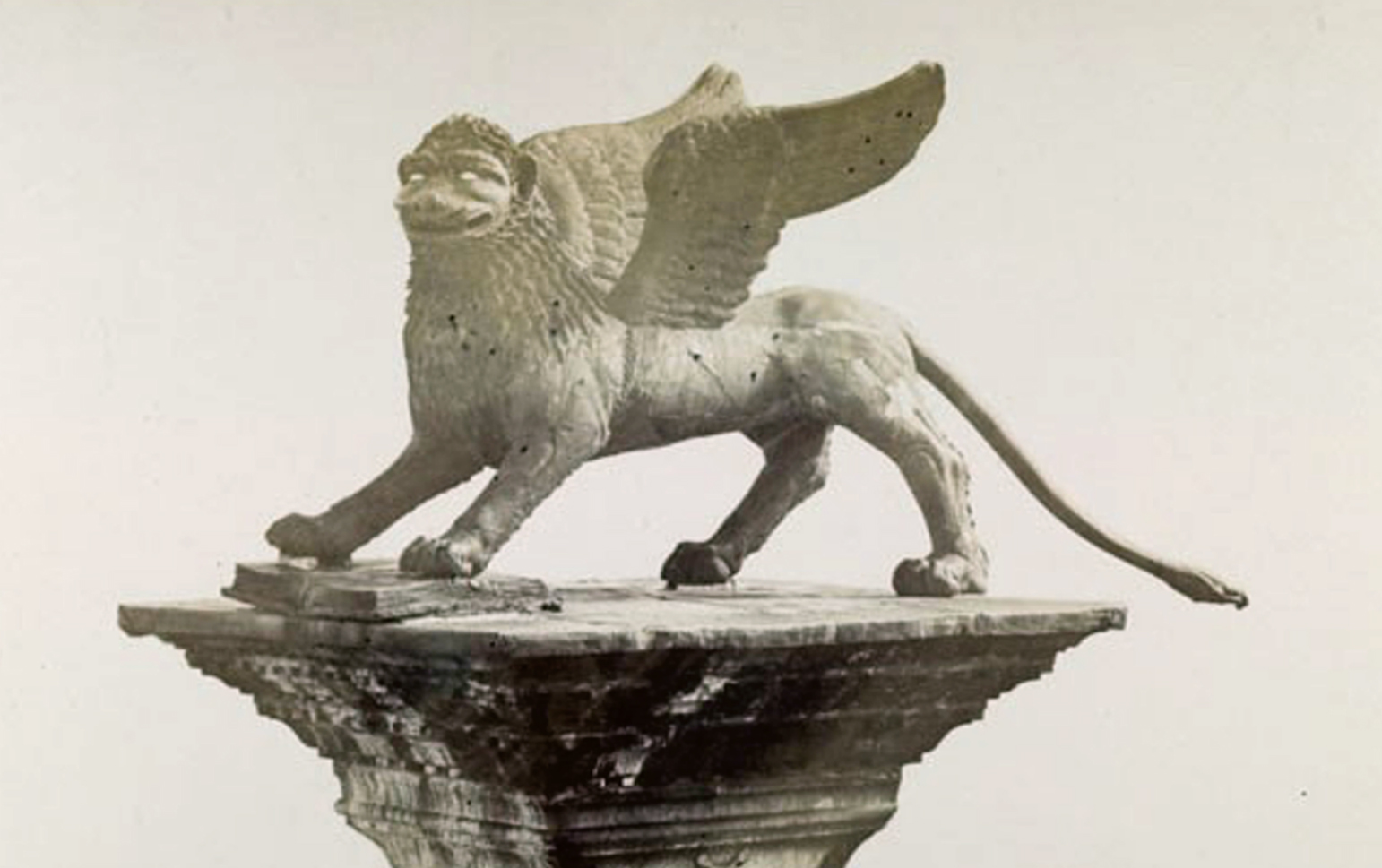 Lion of Venice, Piazzetta San Marco. Contrast levelled & cropped.